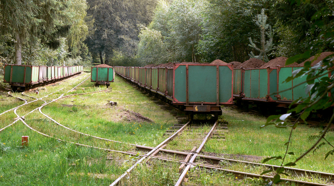 Moorbahn Westerbeck